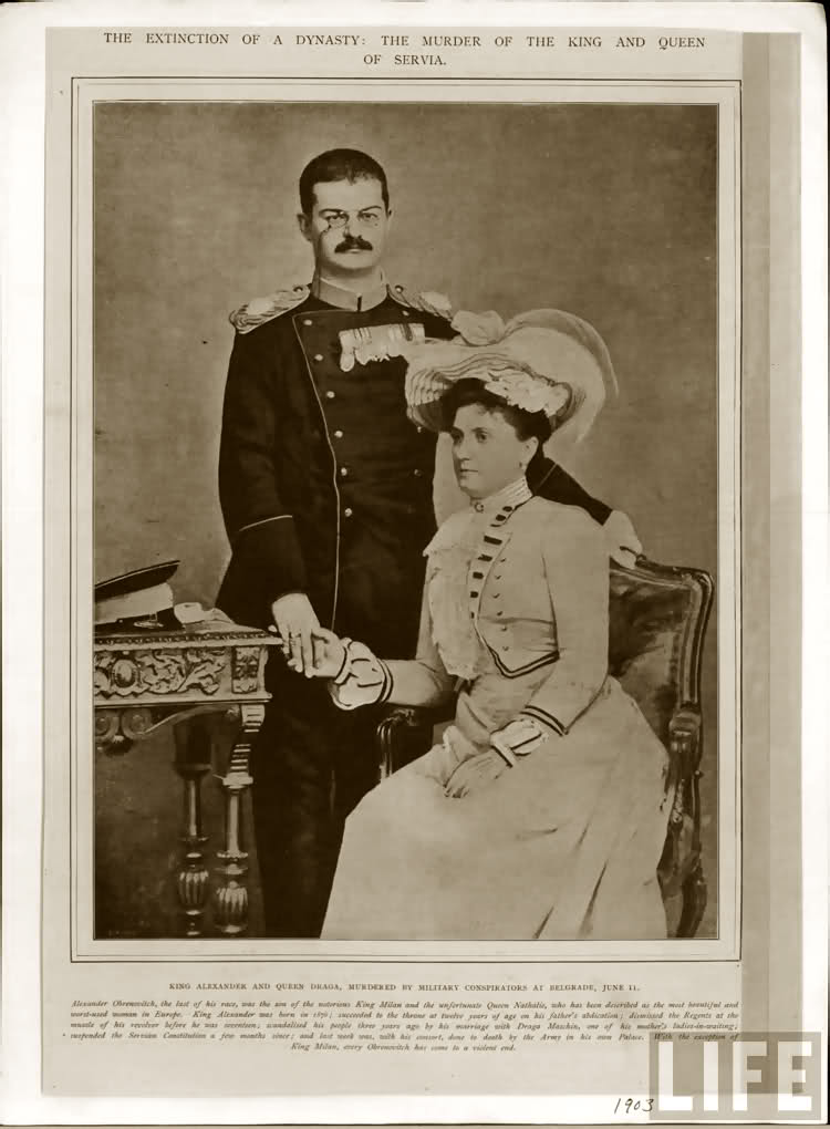 Aleksandar I Obrenović i Draga - članak povodom ubistva